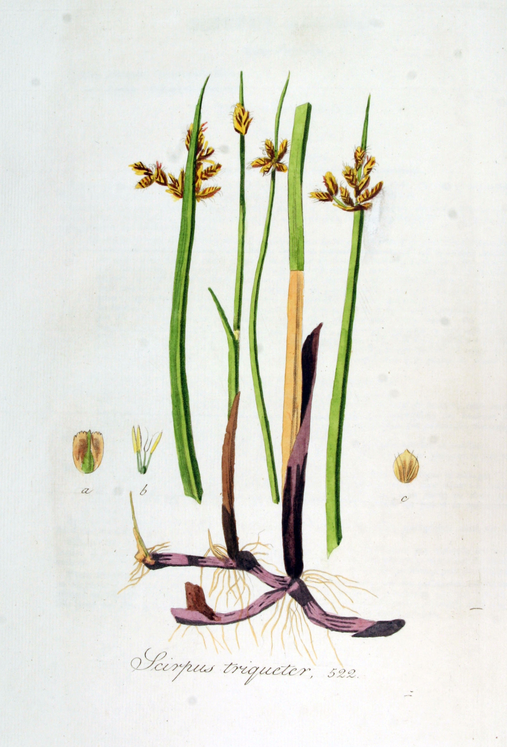 Schoenoplectus triqueter (L.) Palla (Syn. Scirpus triqueter L.)